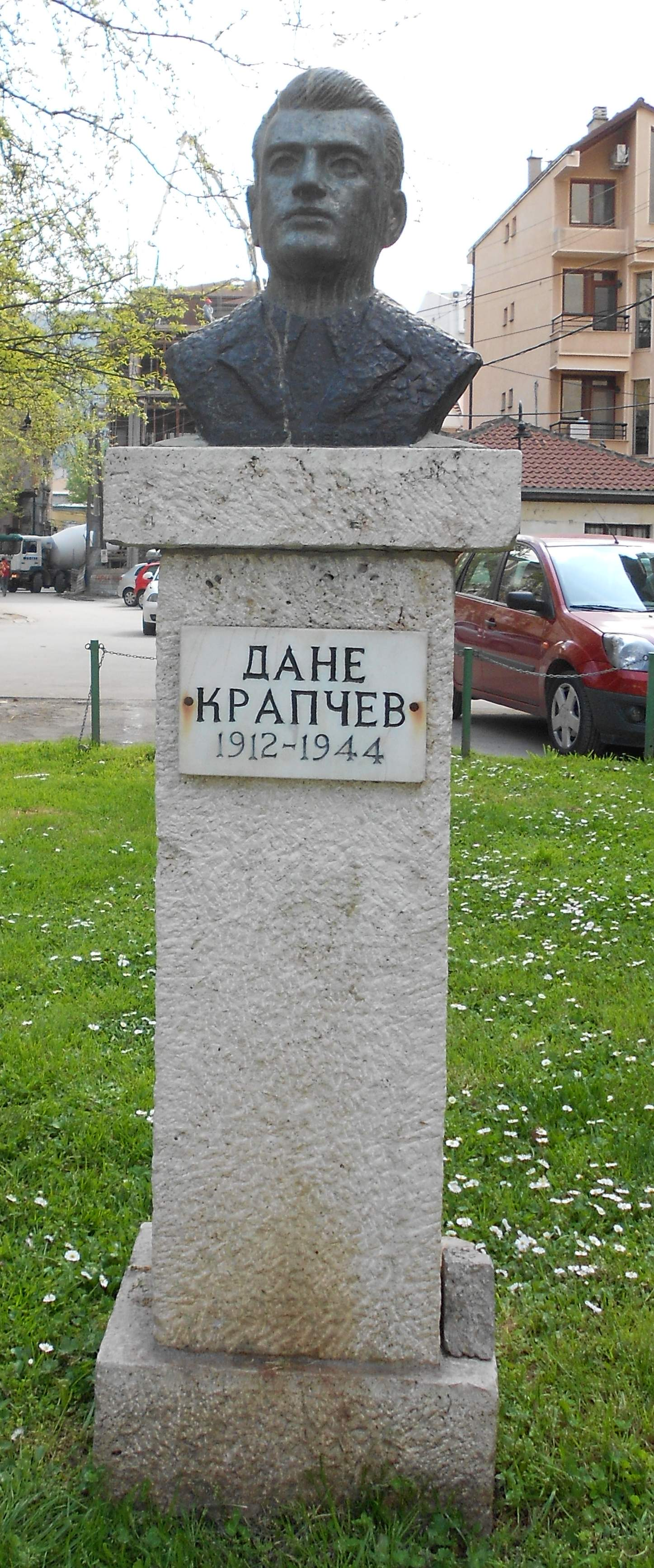 Биста на Даме Крапчев, во близина на Градскиот парк, кај седиштето на Град Скопје